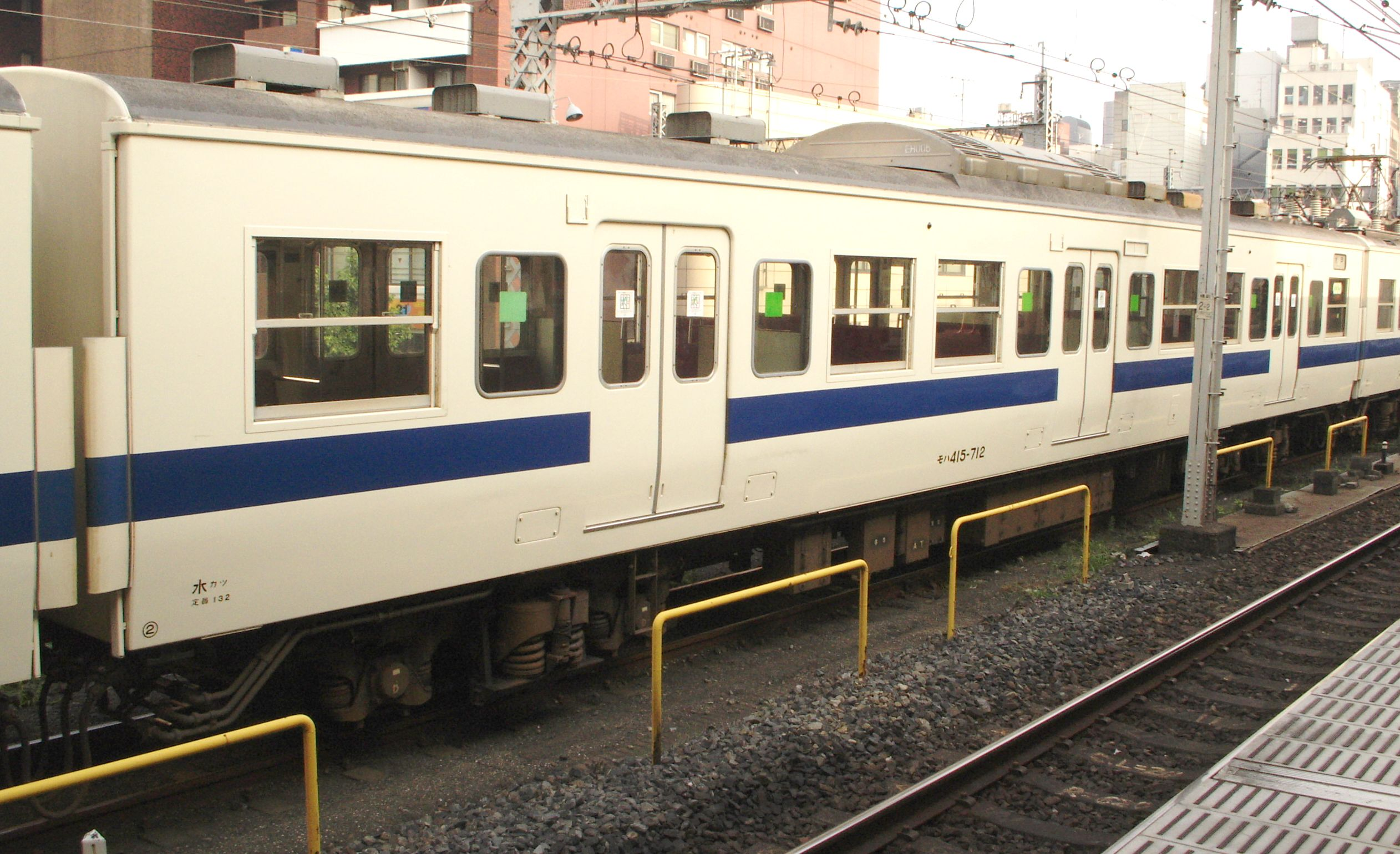 東日本旅客鉄道415系近郊形交直流電車 モハ415-712